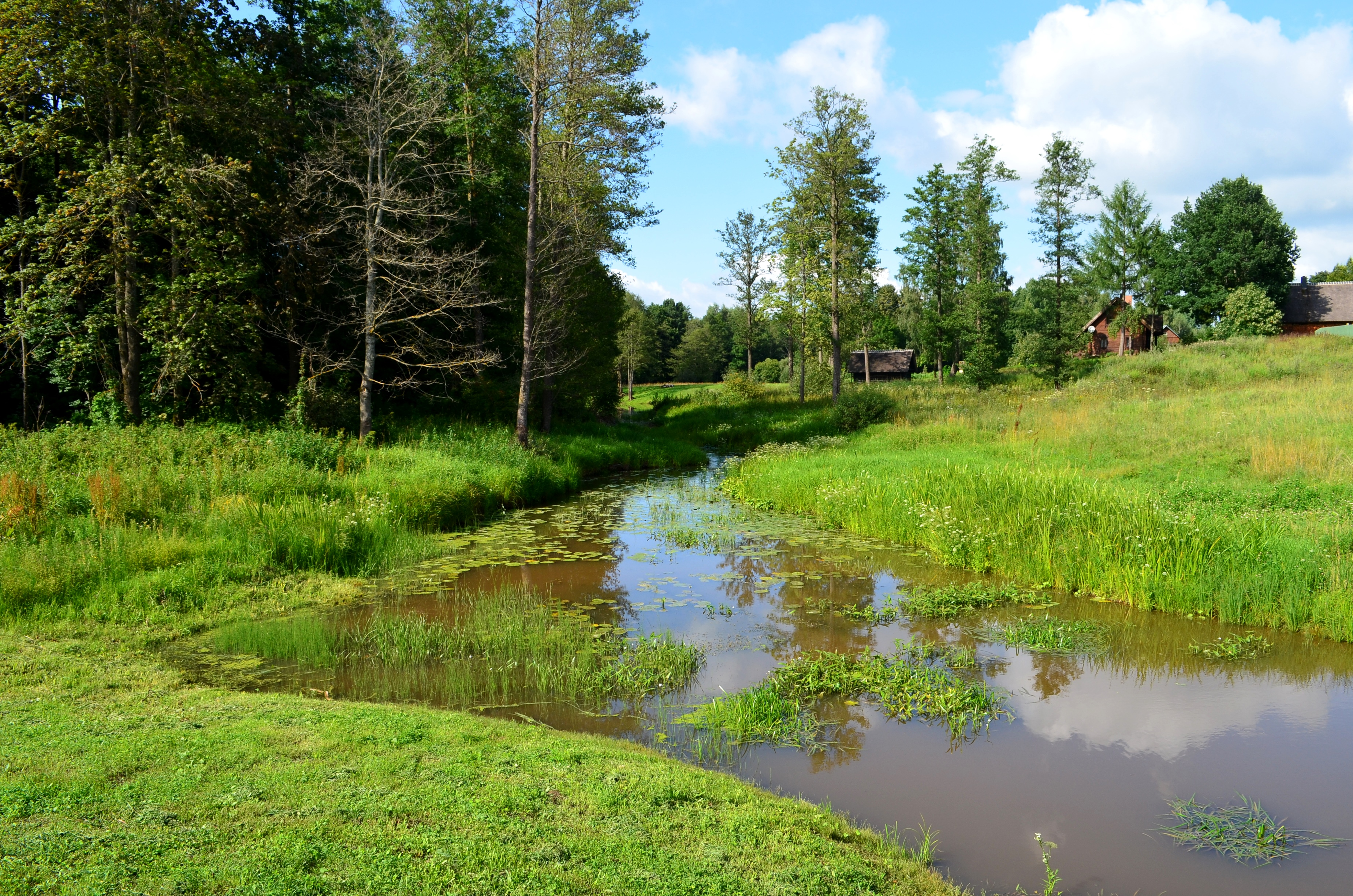 Svyla, Sen. Katinautiškės k., Ignalinos raj.